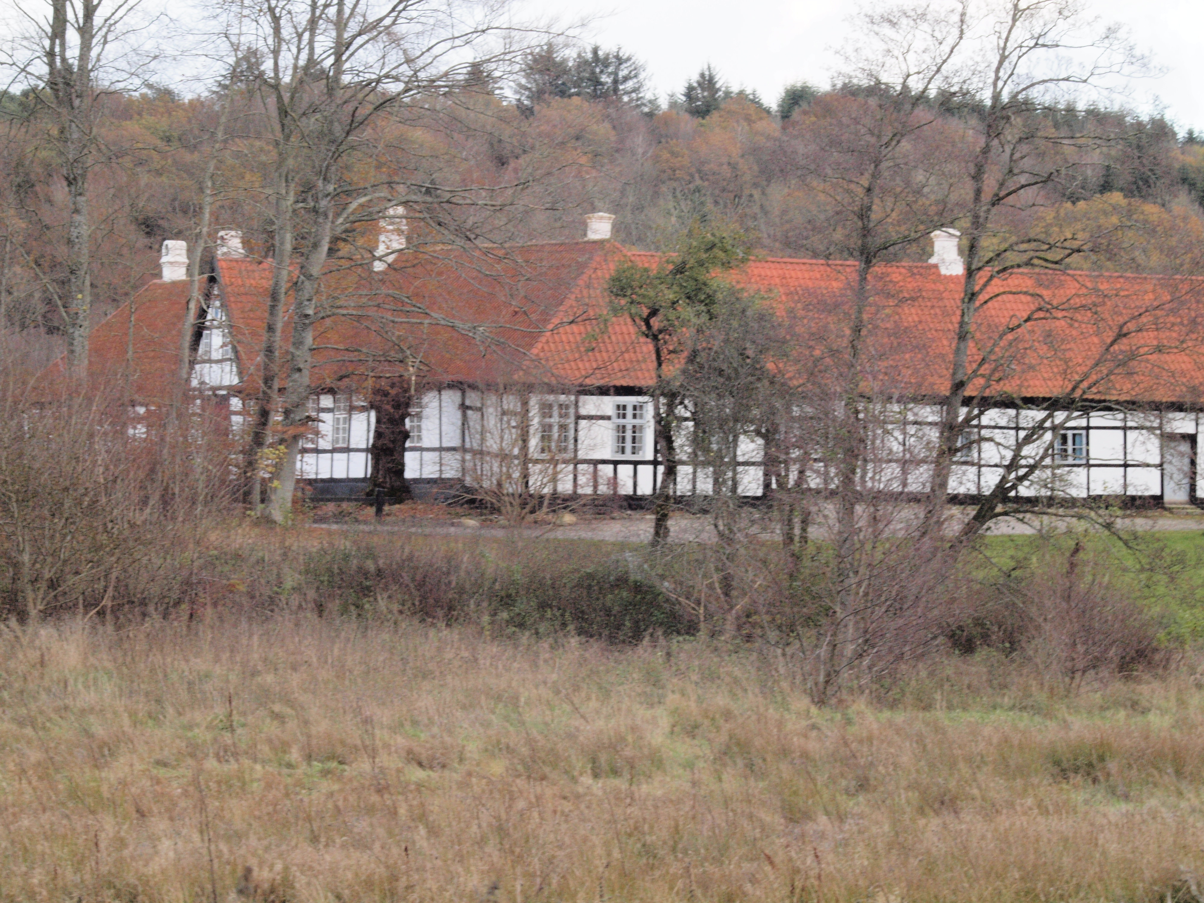 Buderupholm